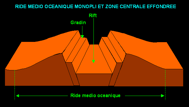 Bloc diagramme de la ride médio-océanique monopli et rift